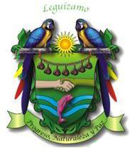 escudo del municipio de puerto leguizamo